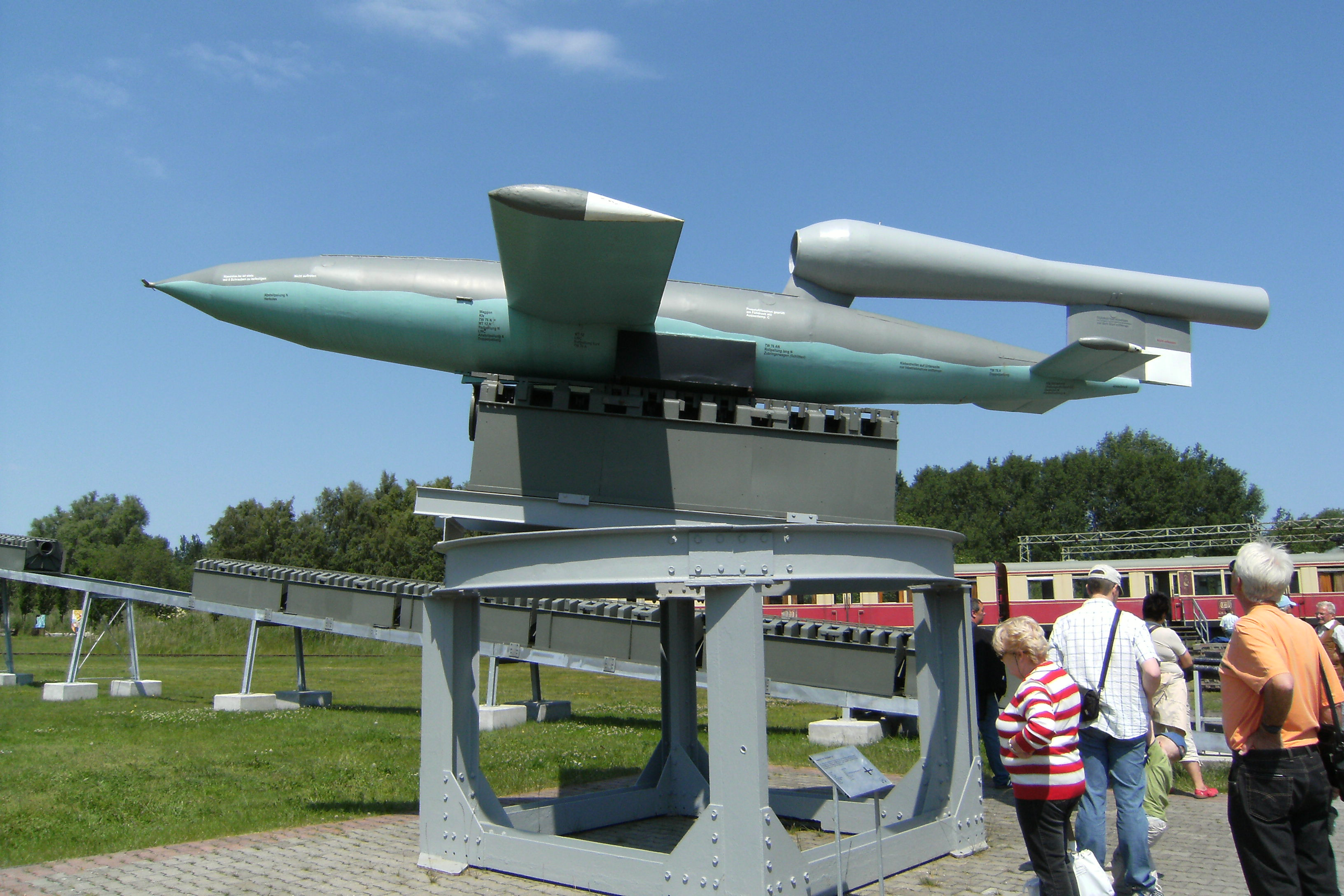 Flügelbombe V1 im Museum Peenemünde